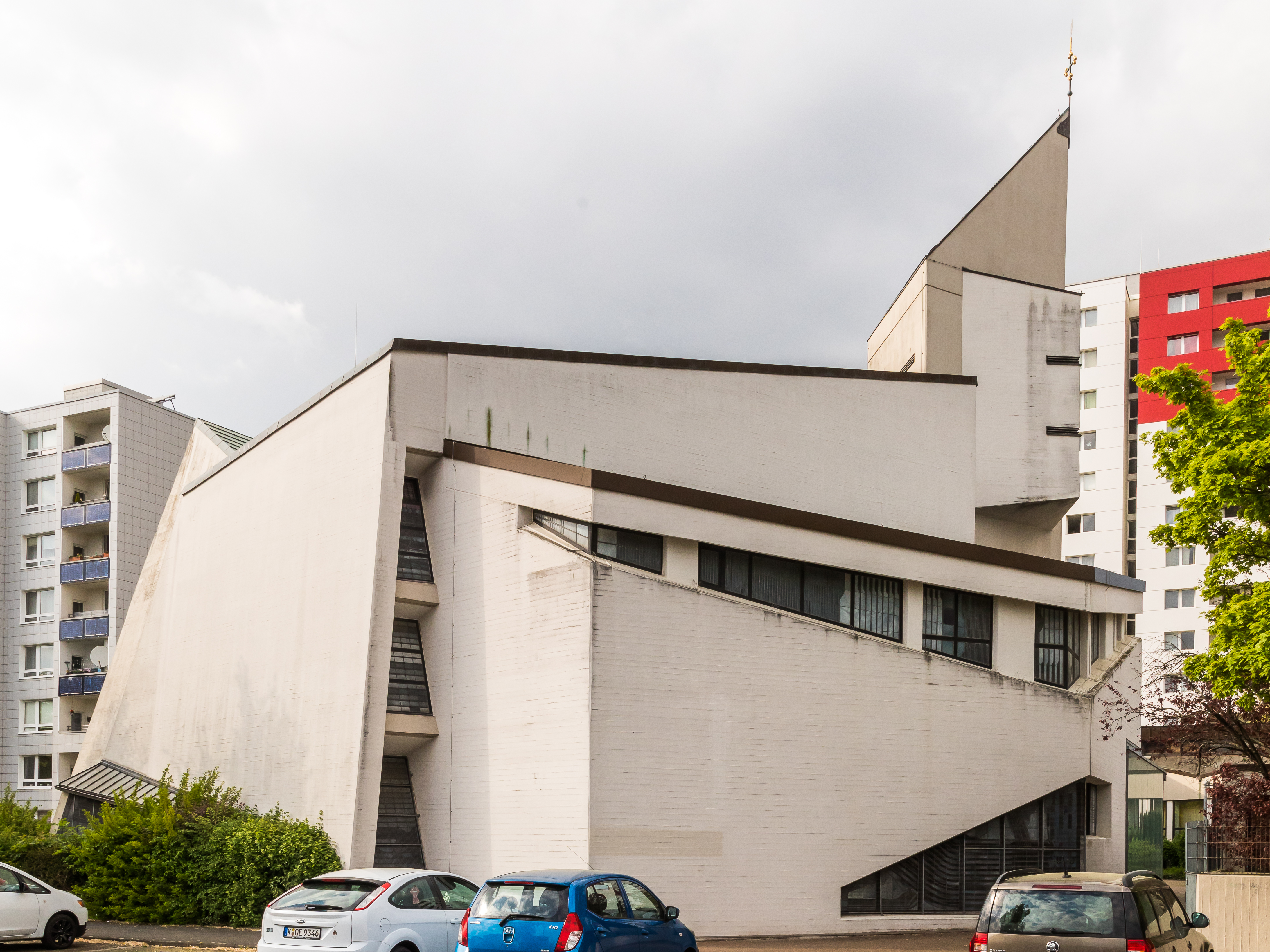 Christi Geburt, Wilhelm-Köln-Löhers-Platz 2, Bocklemünd/Mengenich. Ansicht vom Ollenhauerring